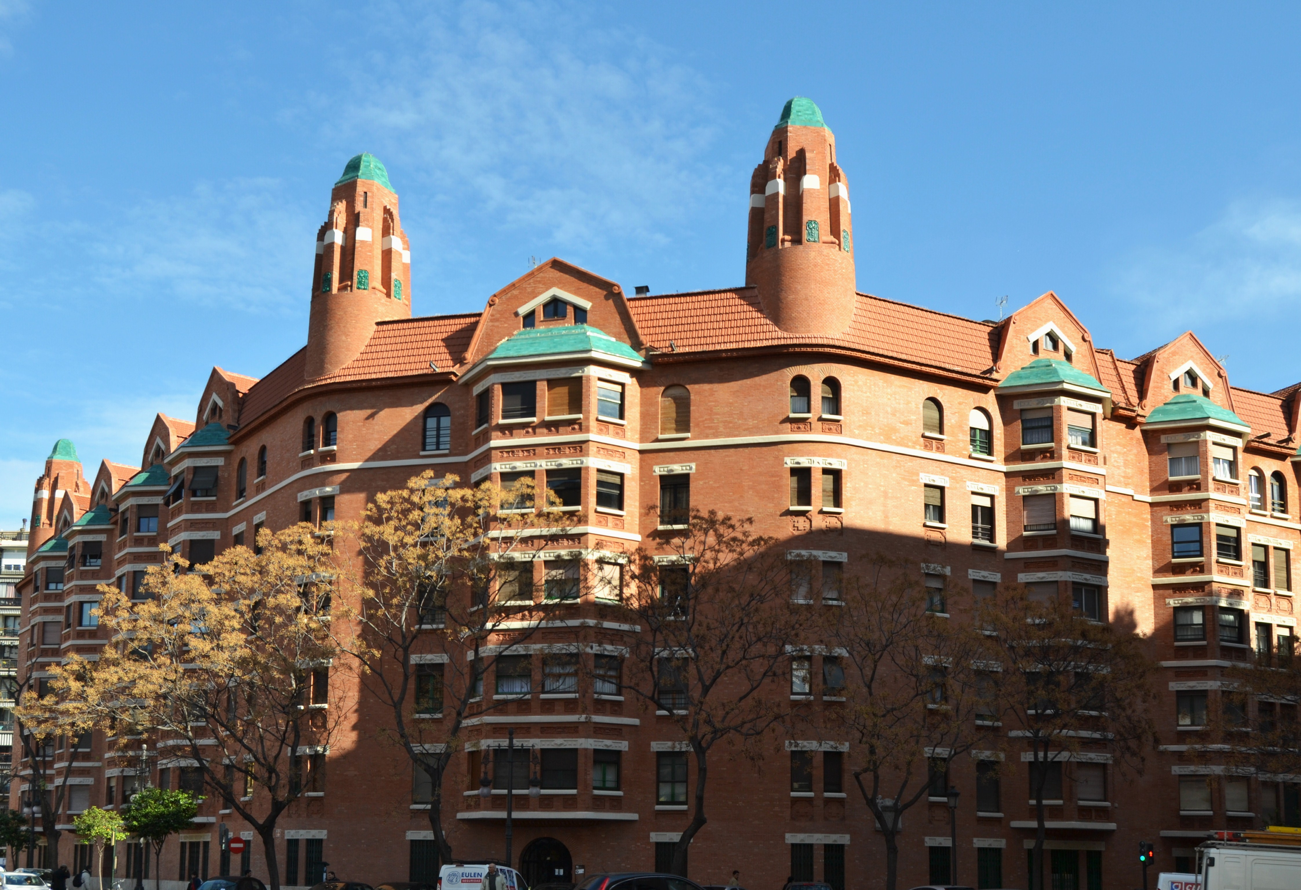 València, finca Roja.